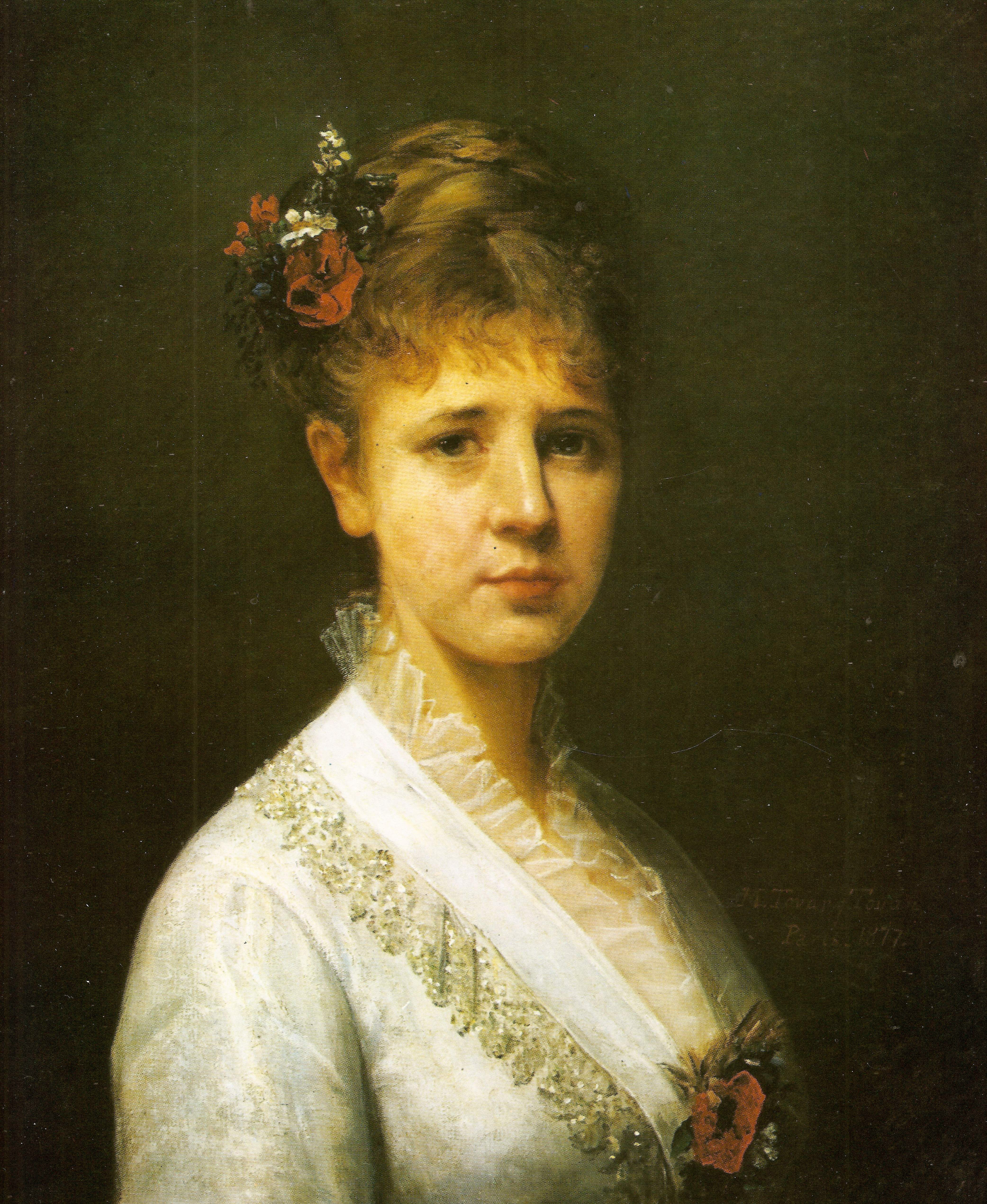 Juana Verrue. 1877. Oleo sobre tela 65,5 x 54,5 cm Colección de la Galería de Arte Nacional. Caracas - Venezuela